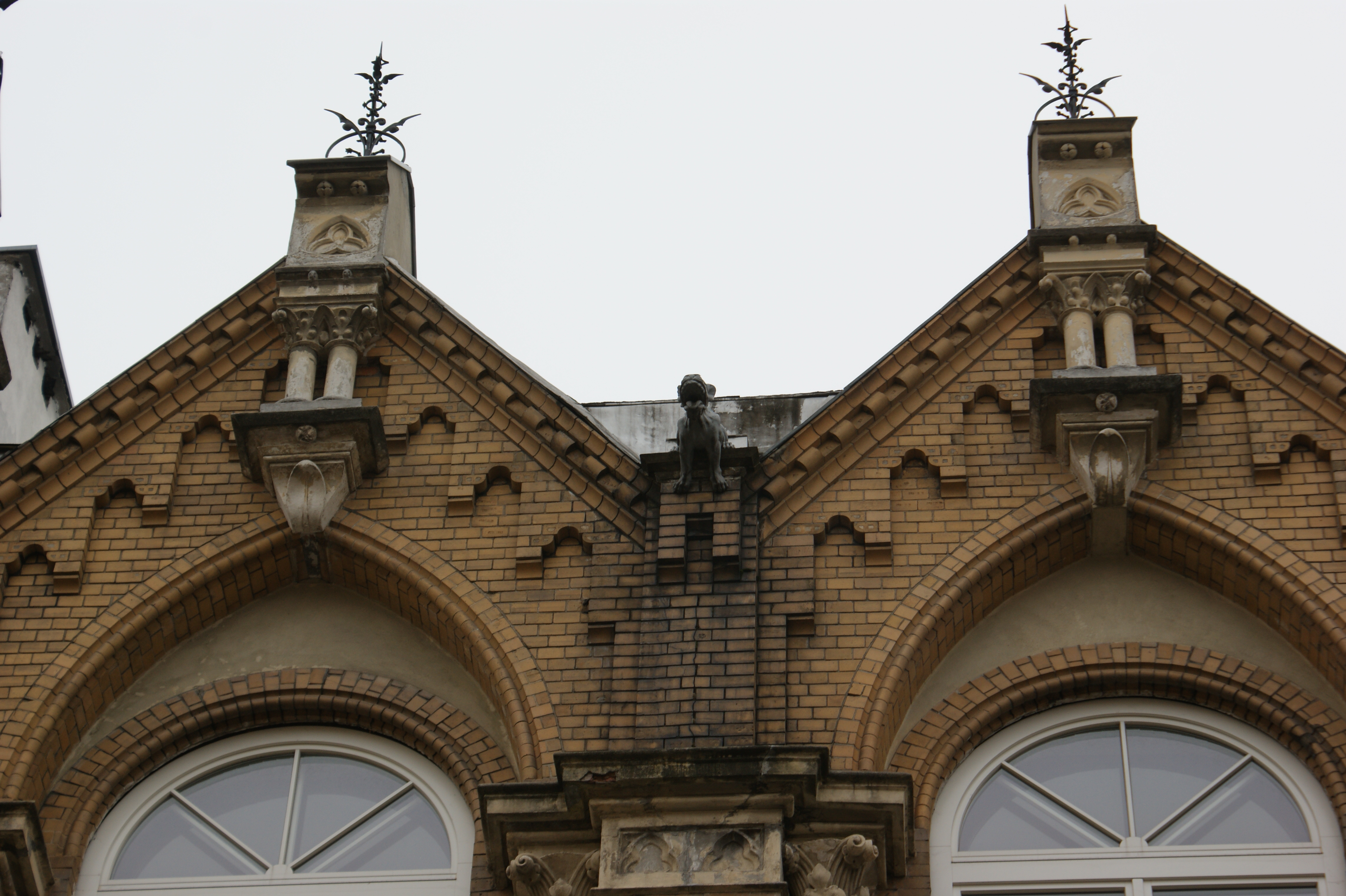 Gmach WTW